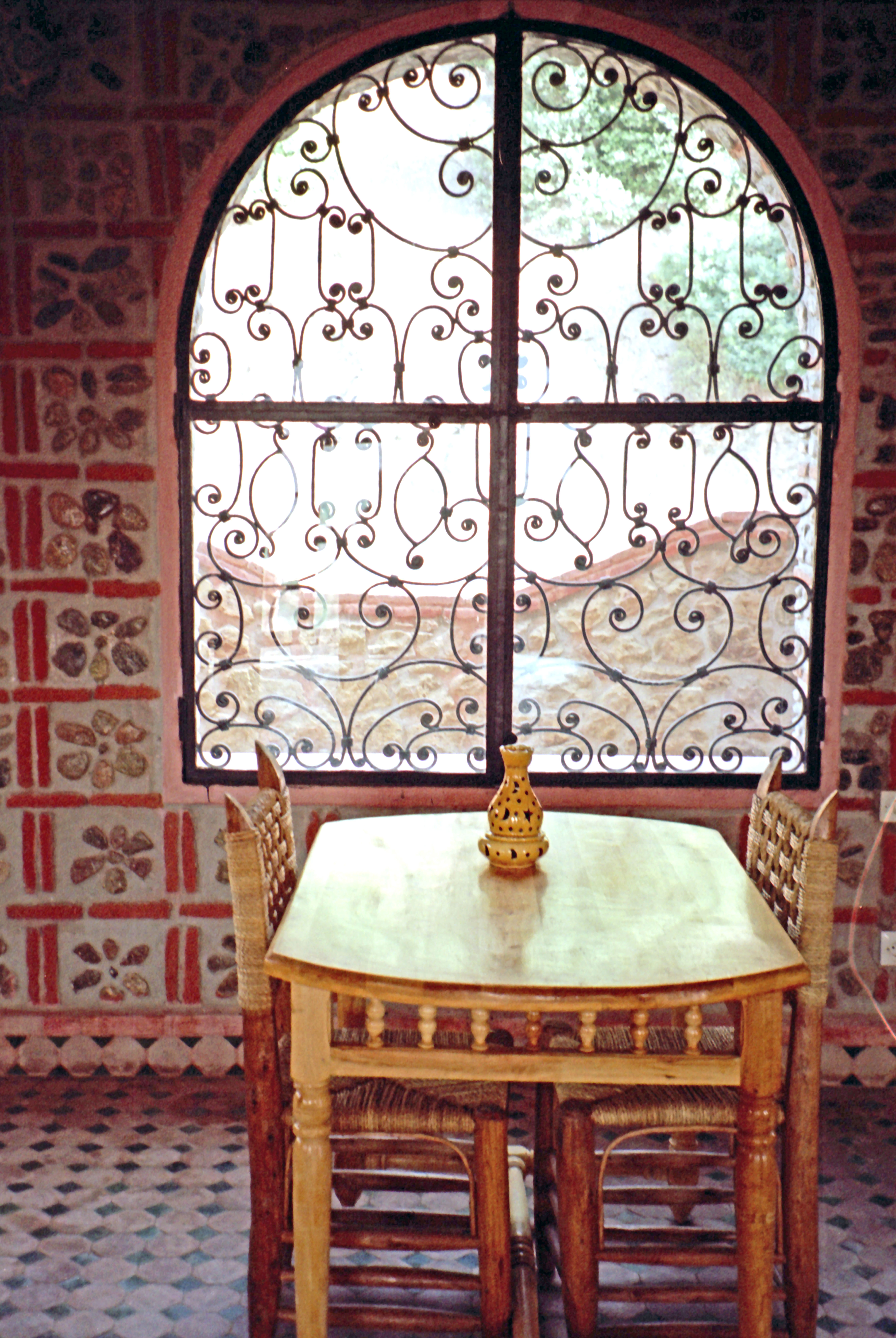 Morocco-91